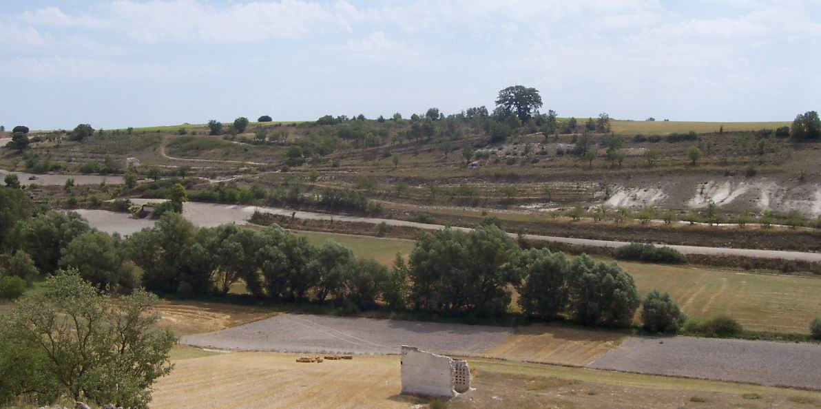 paisaje cerrateño